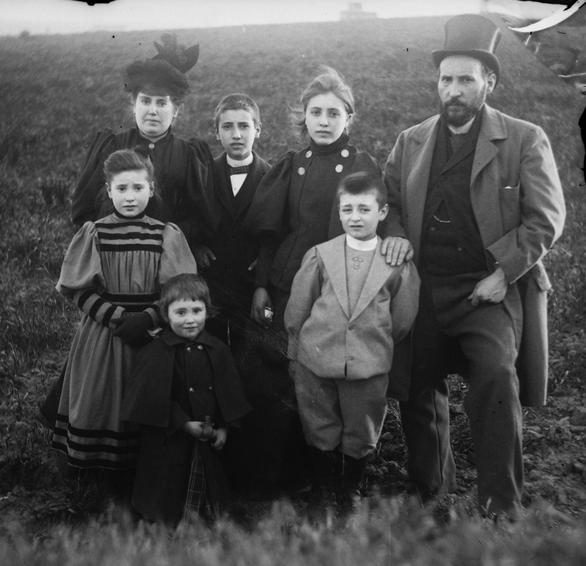 Autorretrato familiar de Cajal con su esposa, Silveria, y sus hijos, hacia 1895